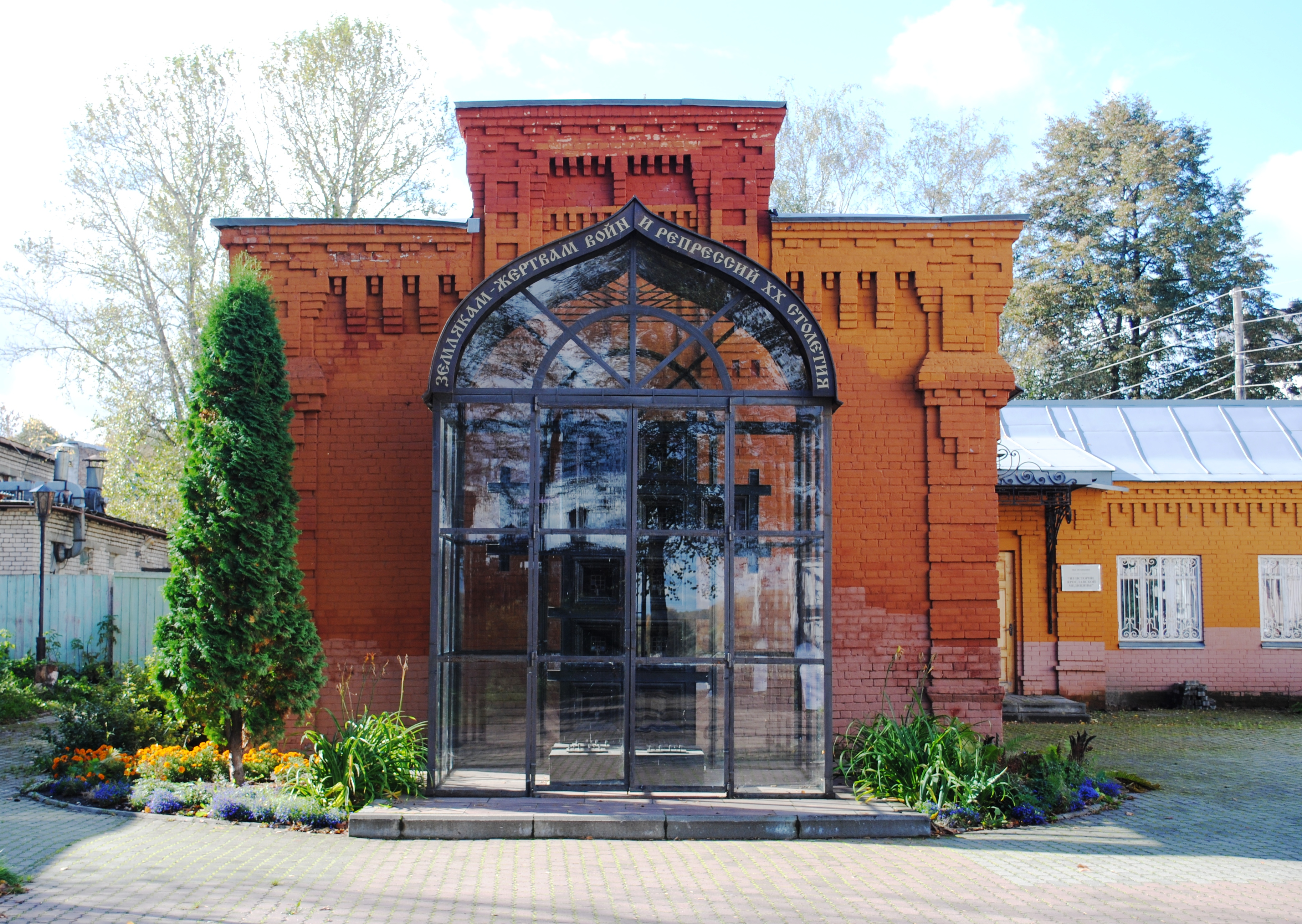 Монумент жертвам репрессий XX века